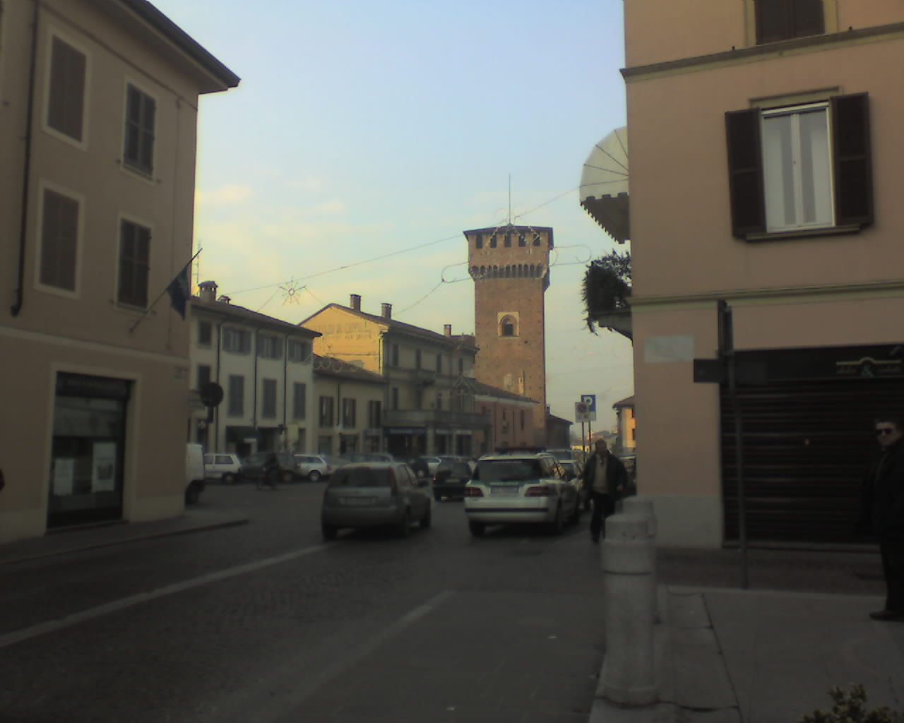 Original caption from it.wiki: "Scorcio di Piazza libertà a Sant'Angelo Lodigiano, scattata dall'utente Deplo."